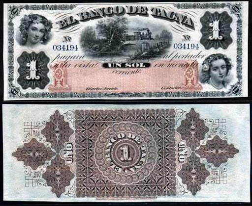 Antiguo Billete del Perú 1 sol BANCO DE TACNA 1872 Con la imagen del ferrocarril Denominación: 1 sol Serie: 034194